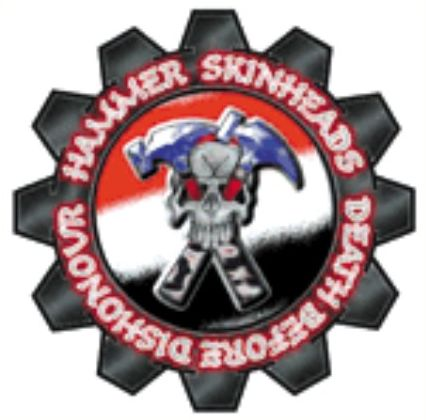 Hammer Skinheads Death Before Dishonovr